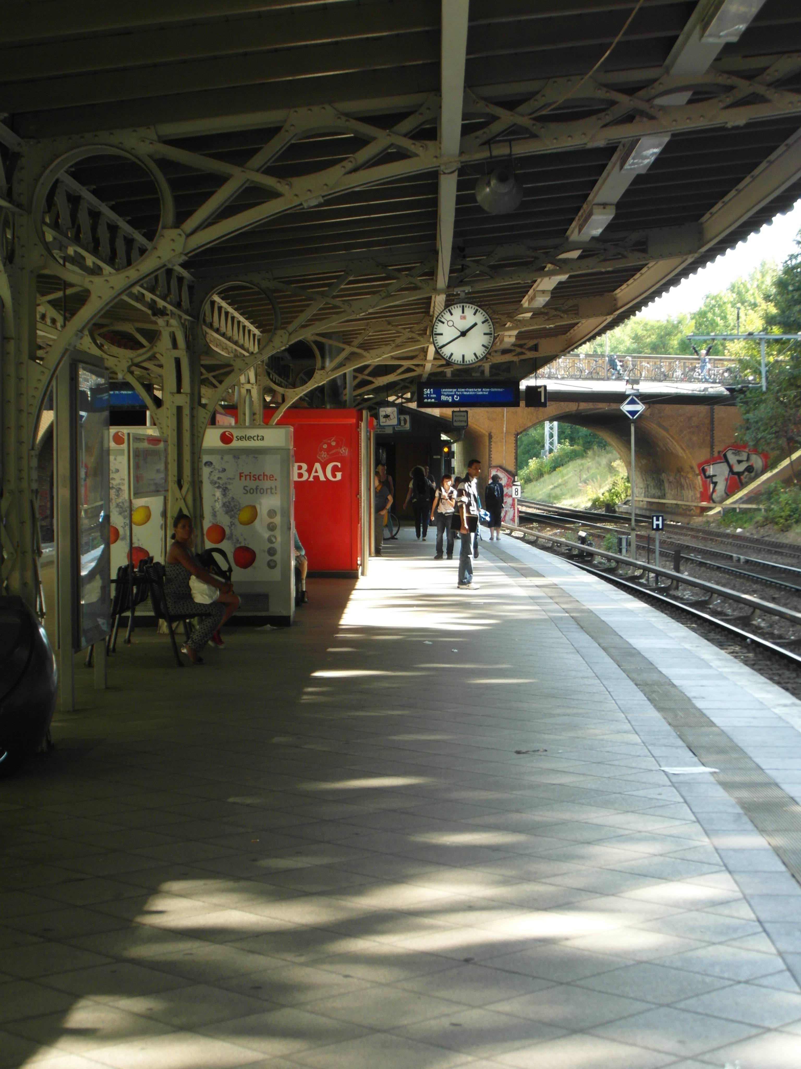 Ringbahn - S41, S42, S8, S9 (zeitweise) und S85 (zur Zeit nicht)